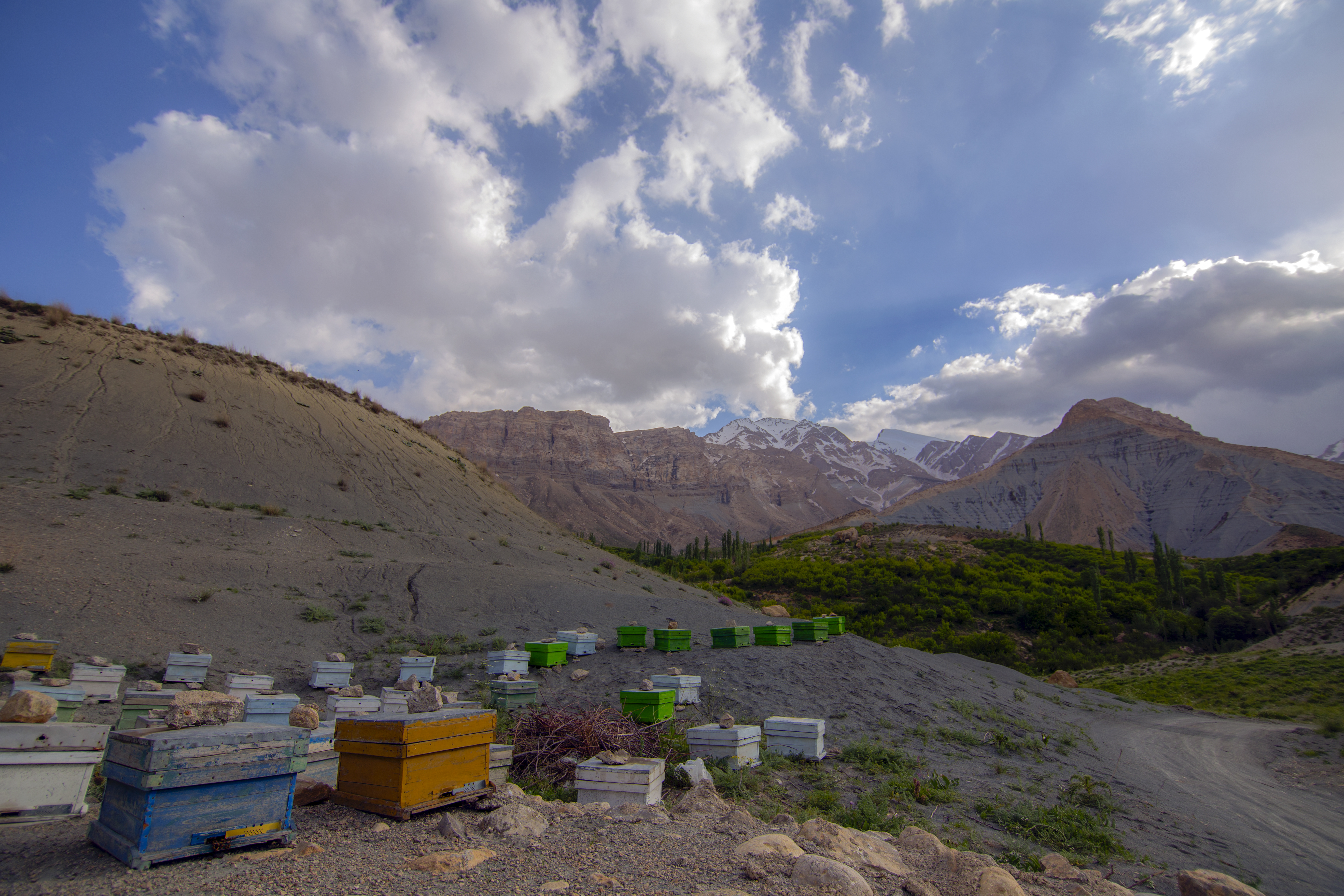 بعضی علت نامگذاری روستا را موقعیت توپوگرافی آن می‌دانند، به طوری که نام اولیه این روستا «خور» به معنای جای گود بوده و این نام به «حفر» و سپس به «خفر» تبدیل شده‌است. همچنین دو امامزاده در این روستا است. روایت دوم کلمه خفر را برگرفته از خور یا غور می‌داند. غور یا غوری نام قبیله یا مردمان اولیه‌ای می‌باشد که در این محل سکونت داشته‌اند. برخی نیز این لغت را برگرفته از گور یا گبر می‌دانند که خود آیینی قبل از اسلام را در منطقه معرفی می‌نماید. روستای خفر به «عروس دنا» نیز معروف است.